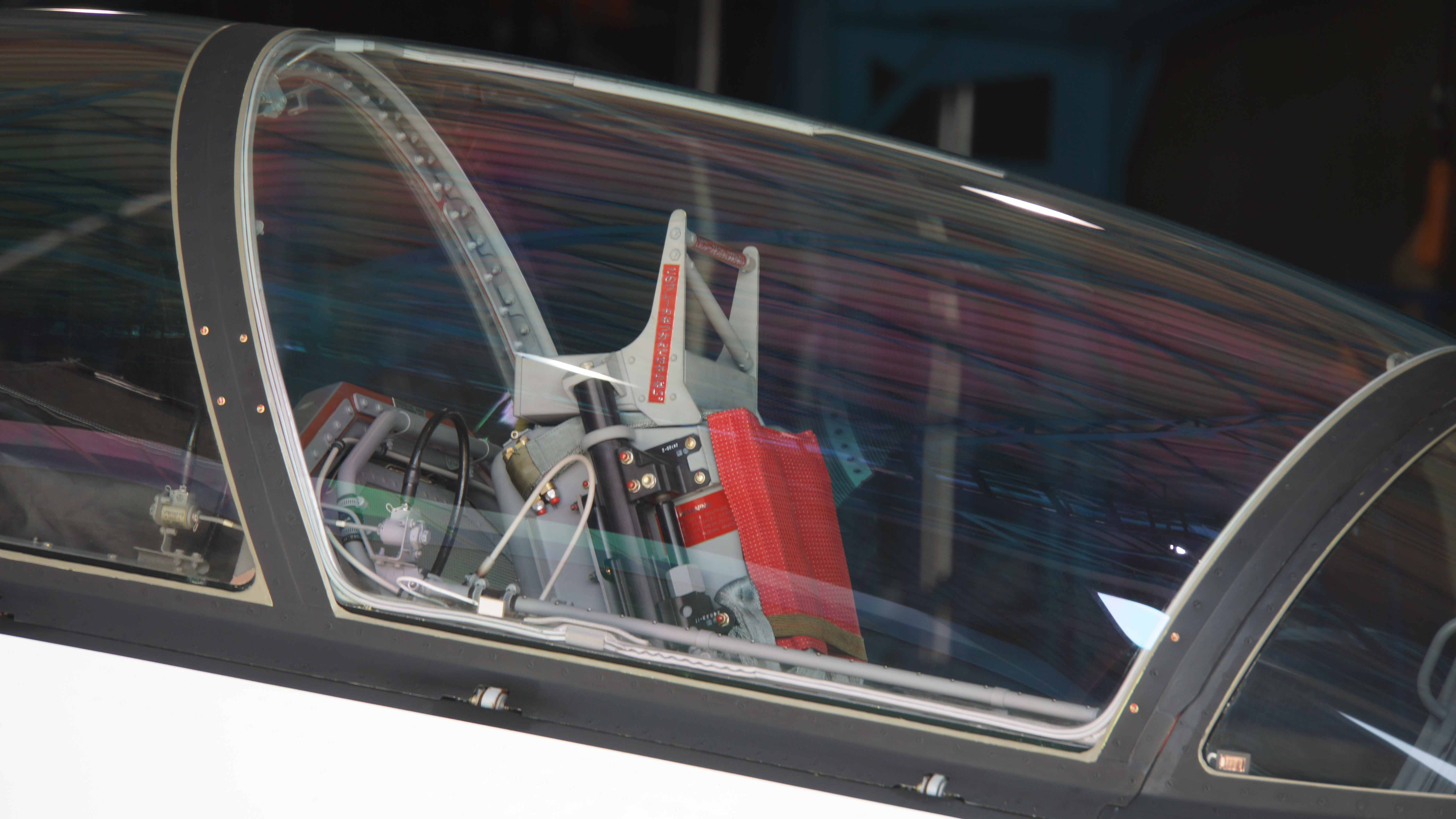 先進技術実証機 X-2 座席。2016年10月30日 航空自衛隊岐阜基地にて。